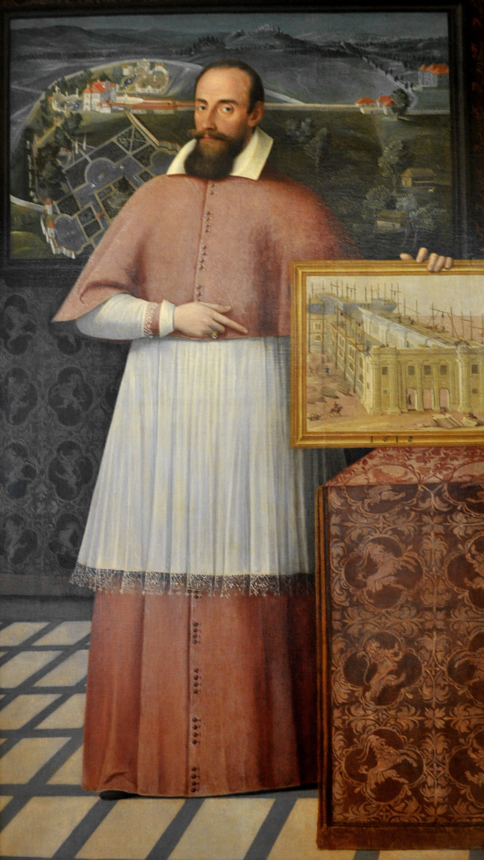 Erzbischof Markus Sittikus von Hohenems vor einem Gemälde von Schloss Hellbrunn, in der Hand ein Gemälde des Salzburger Doms im Bau